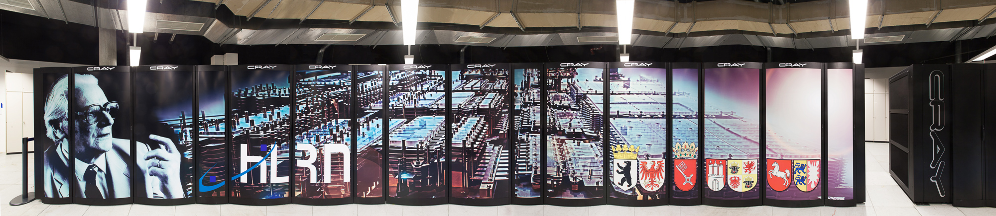 Cray XC30/XC40 "Konrad" at Zuse Institute Berlin